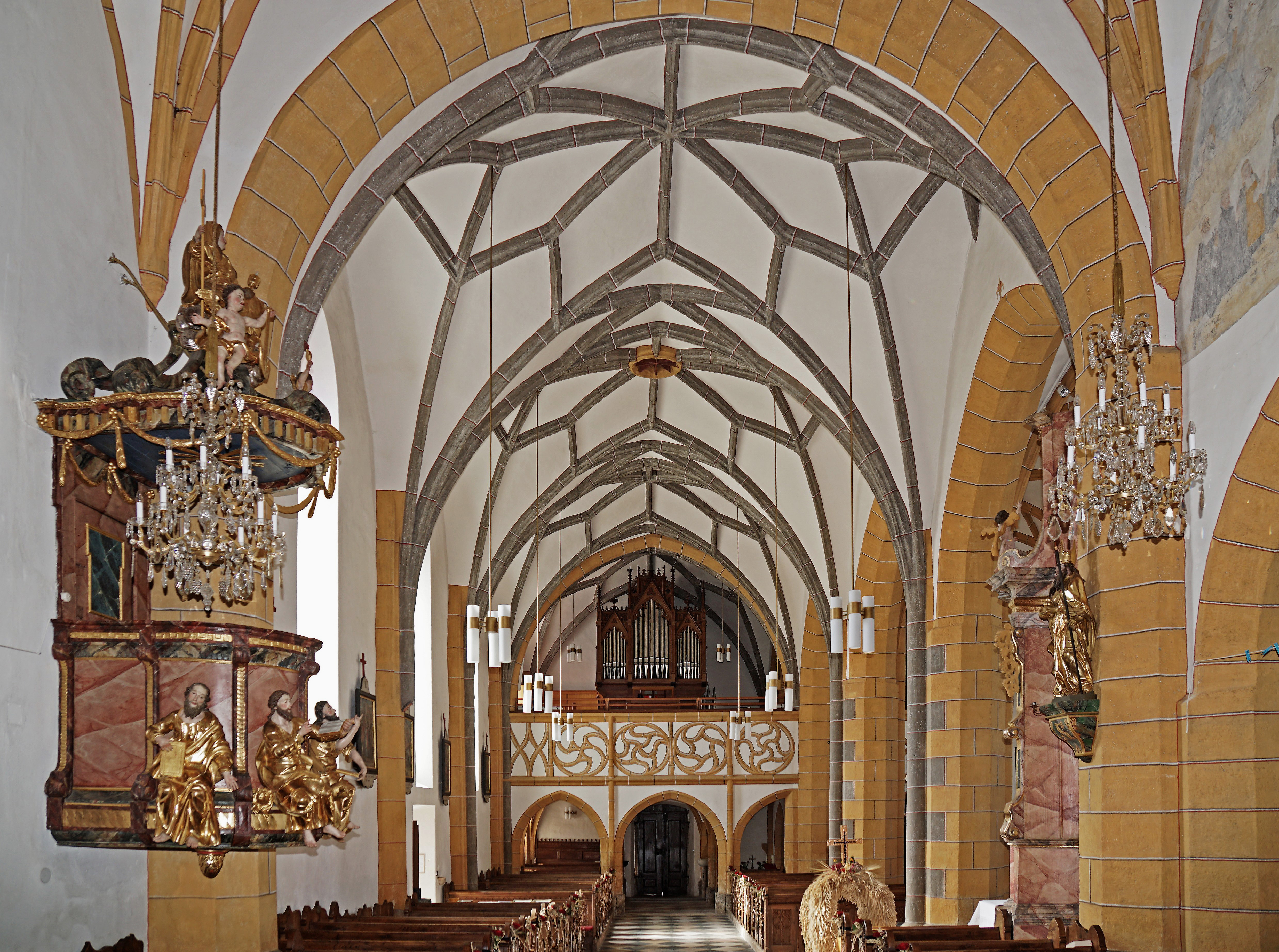 Kath. Pfarrkirche Hll. Petrus und Paulus, Bleiburg, Innenansicht gegen die Orgelempore